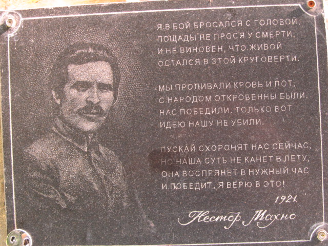 Надпись на памятном камне.